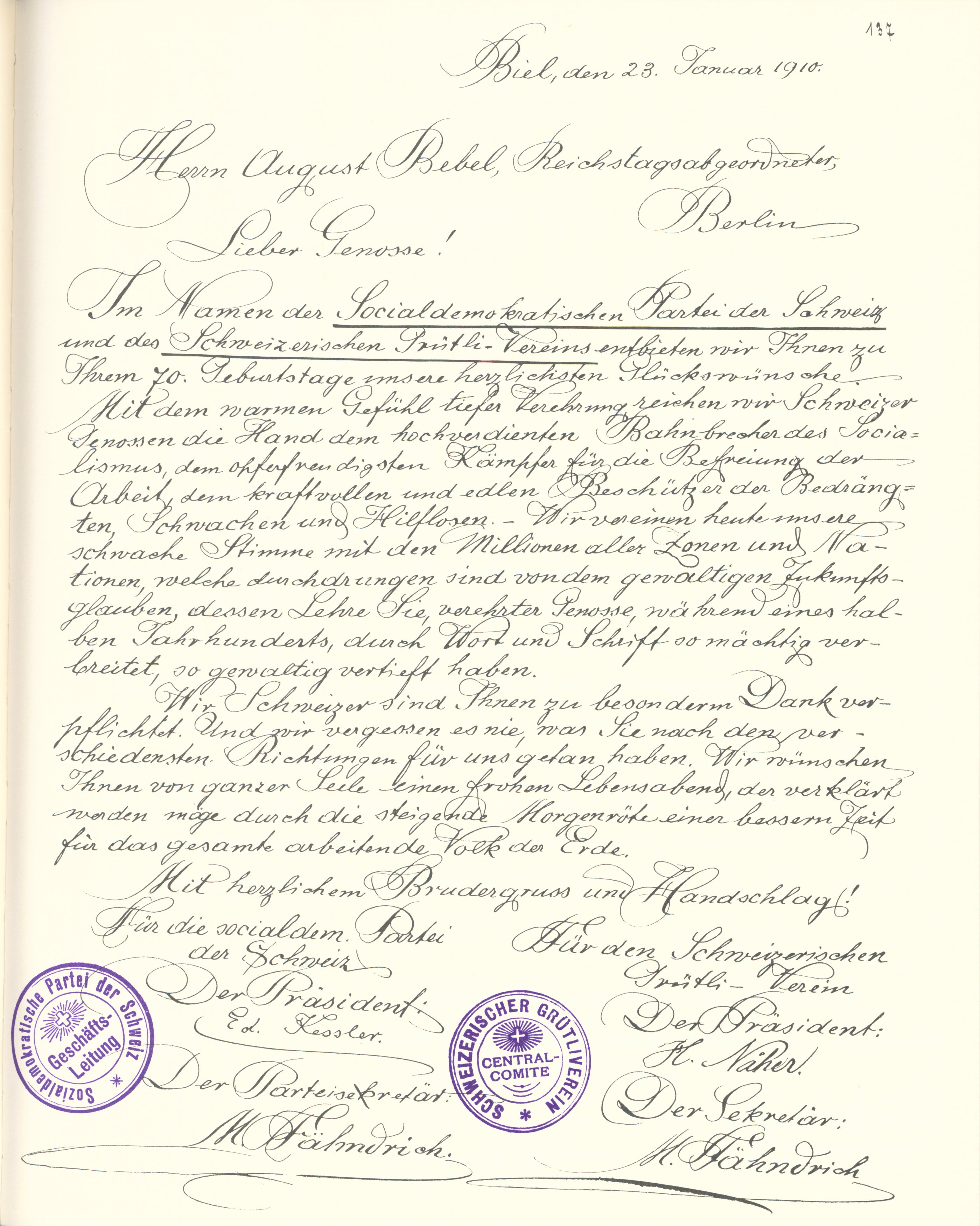 Glückwunschschreiben zum 70. Geburtstag von August Bebel: Sozialdemokratische Partei der Schweiz und Grütliverein